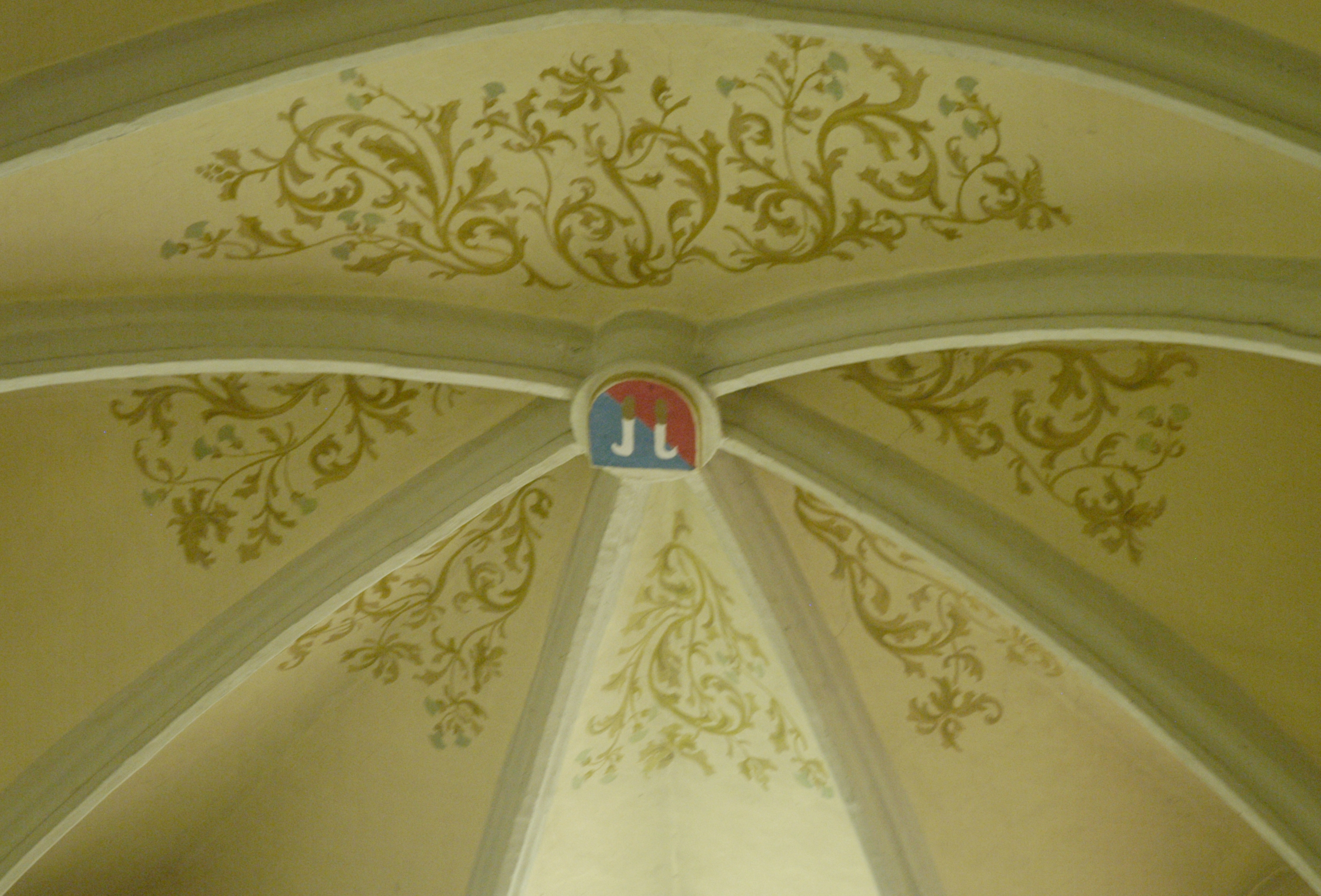 Kath. Pfarrkirche hll. Peter und Paul Gewölbe Chor